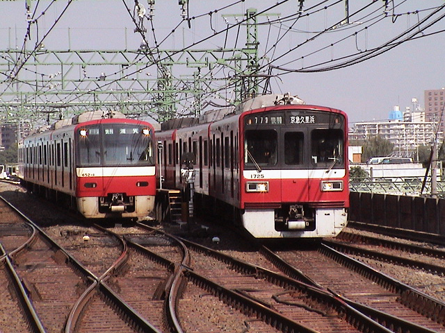 京急川崎の引き上げ線で快特久里浜行き8両編成の通過待ちをする快特浦賀行き4両編成。このあと、8両の後ろに連結する。